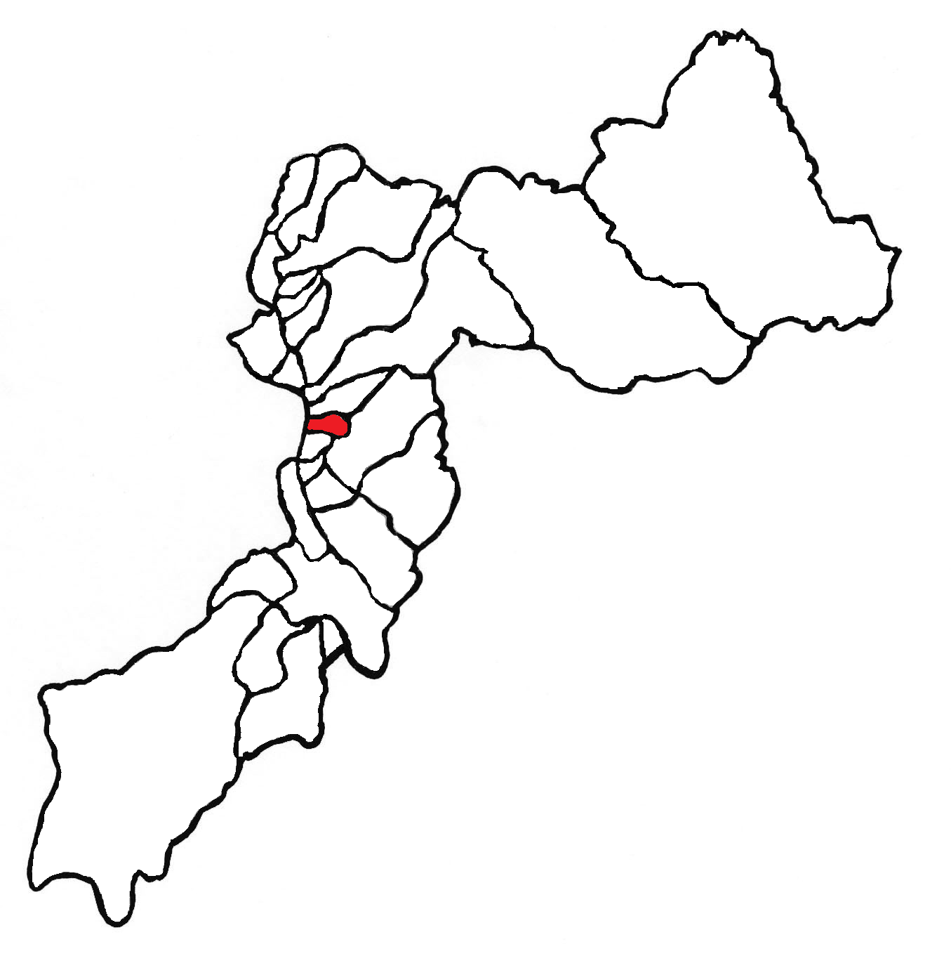 Ubicación del distrito en la provincia de Huancayo, departamento de Junín, Perú